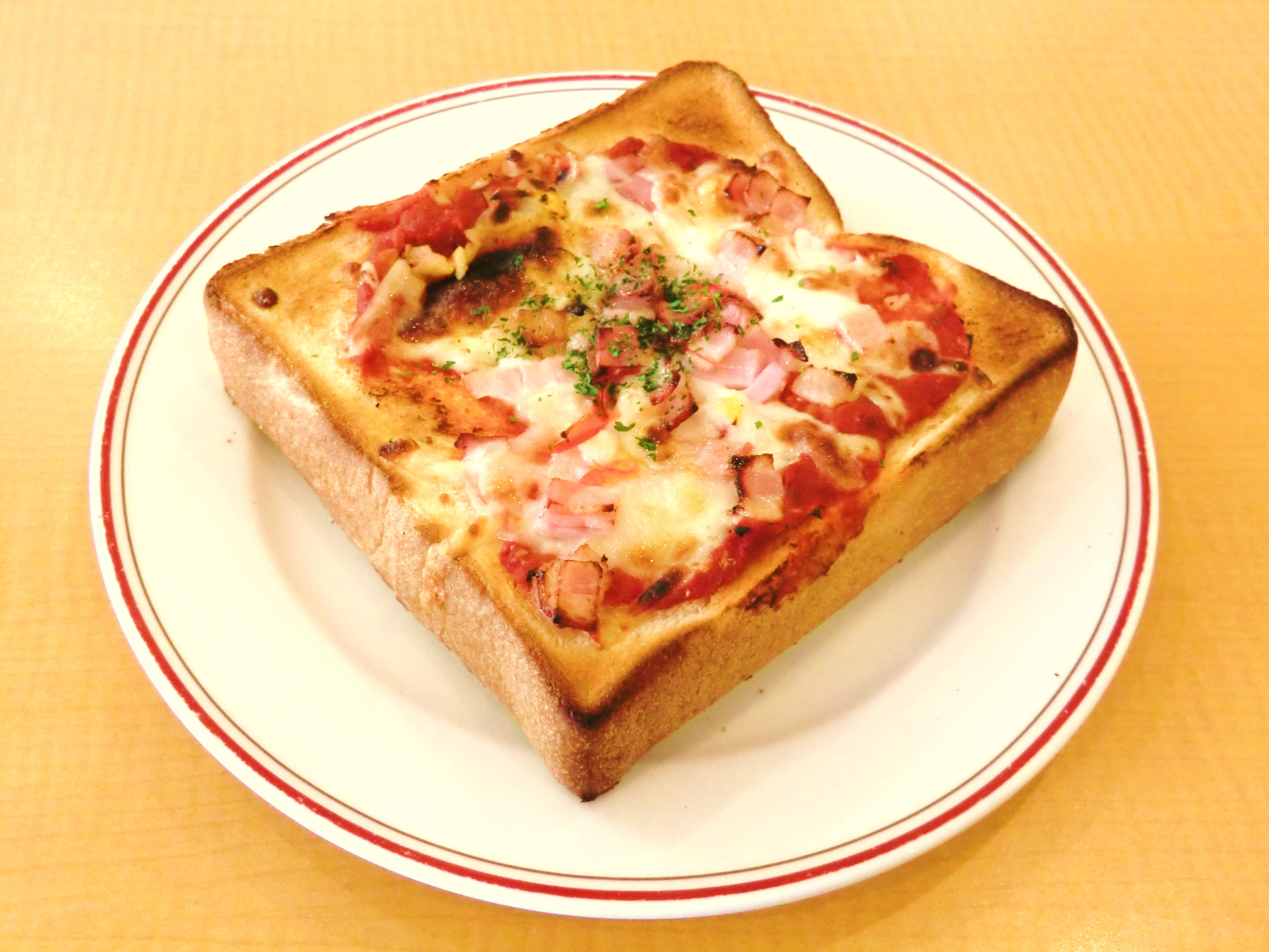 ピザトースト。ファミリーレストラン「ガスト」にて